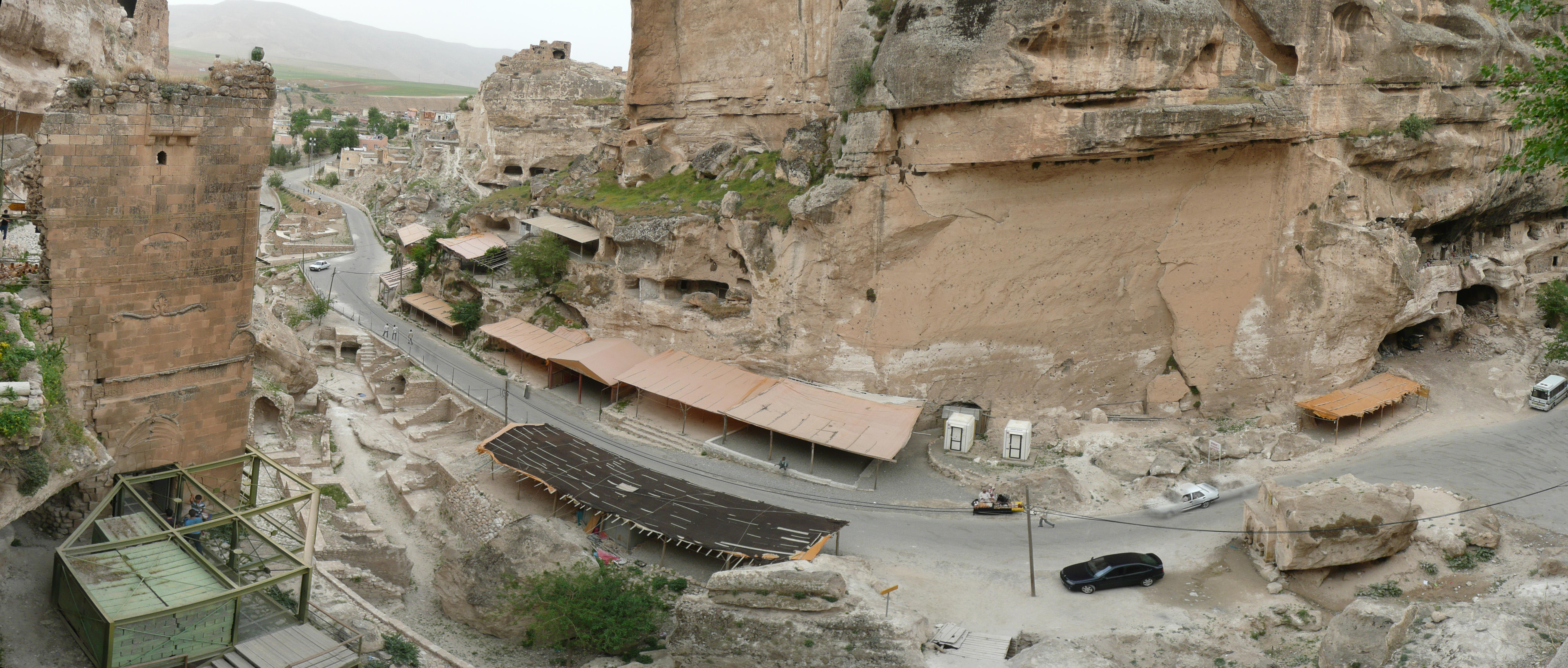 Hasankeyf, Batman, Turkey